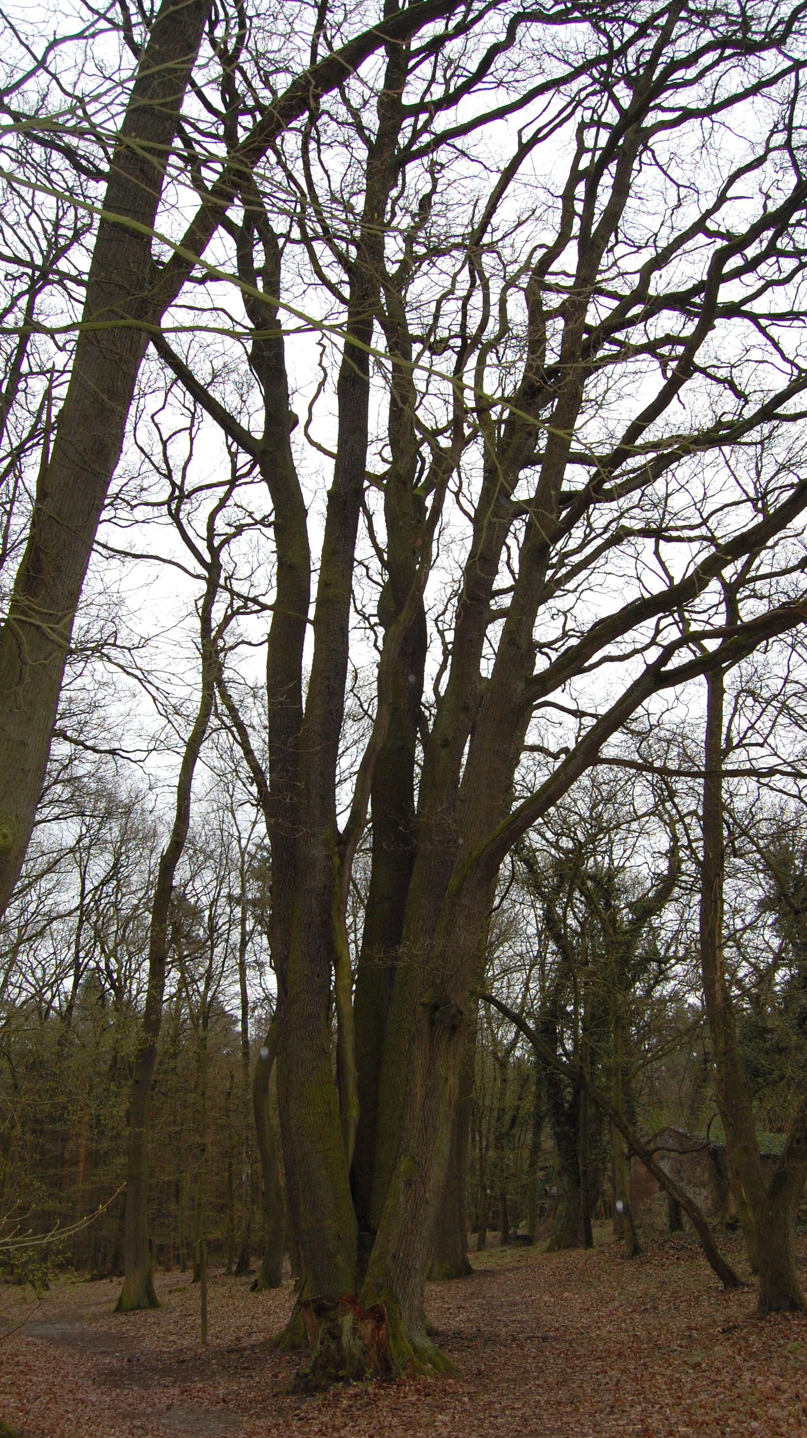 Fünf-Brüder-Eiche beim Forsthaus Barsberge